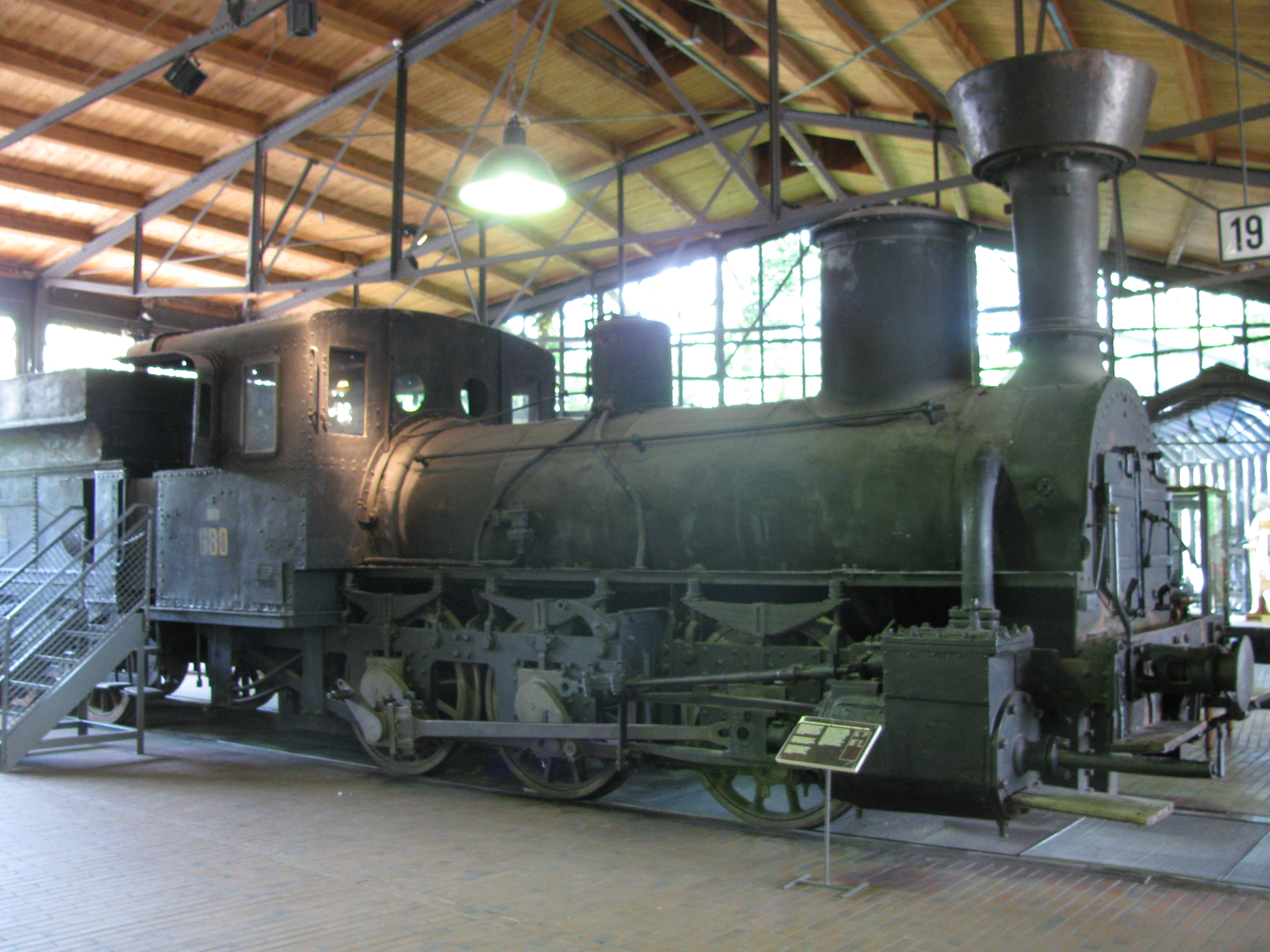 Bau 1860 als eine von 205 Maschinen der Reihe 23 bzw. Reihe 29 für die österreichische Südbahn. Ab den Dreissiger Jahren von der Graz-Köflacher Bahn im Rangierdienst und vor Güterzügen eingesetzt, 1965 ausgemustert. 1962 aus eigener Kraft Werbefahrt durch Deutschland für den Film "Der General". 1966 Übernahme durch das Verkehrsmuseum Berlin, Ankunft dort 1987 nach Lagerung in München, Neuenmarkt-Wirsberg und Bamberg in Einzelteilen.